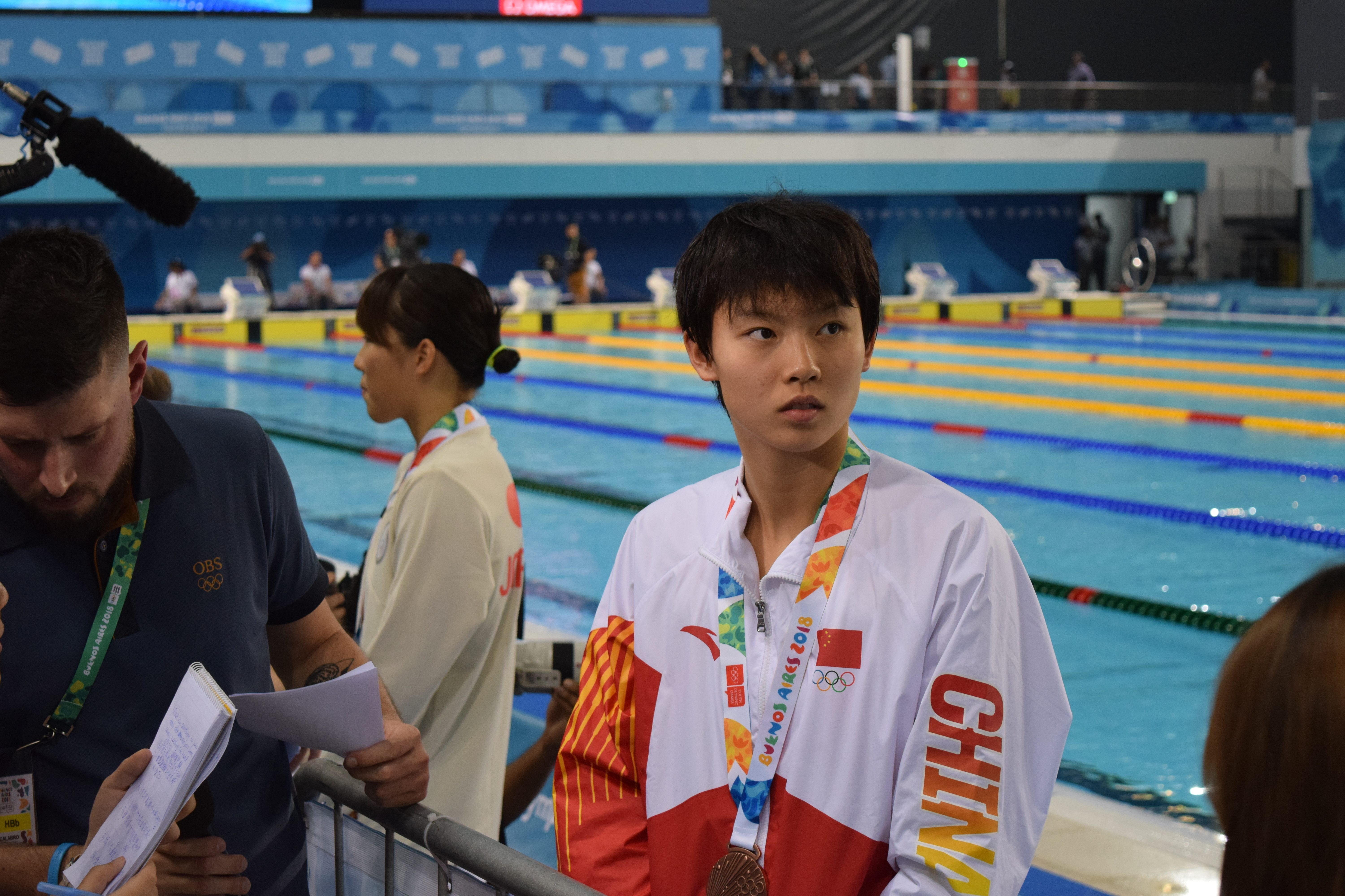 Finales de natación , durante los Juegos Olímpicos de la Juventud 2018 en Buenos Aires. Tarde del 10 de octubre. Junxuan YANG.